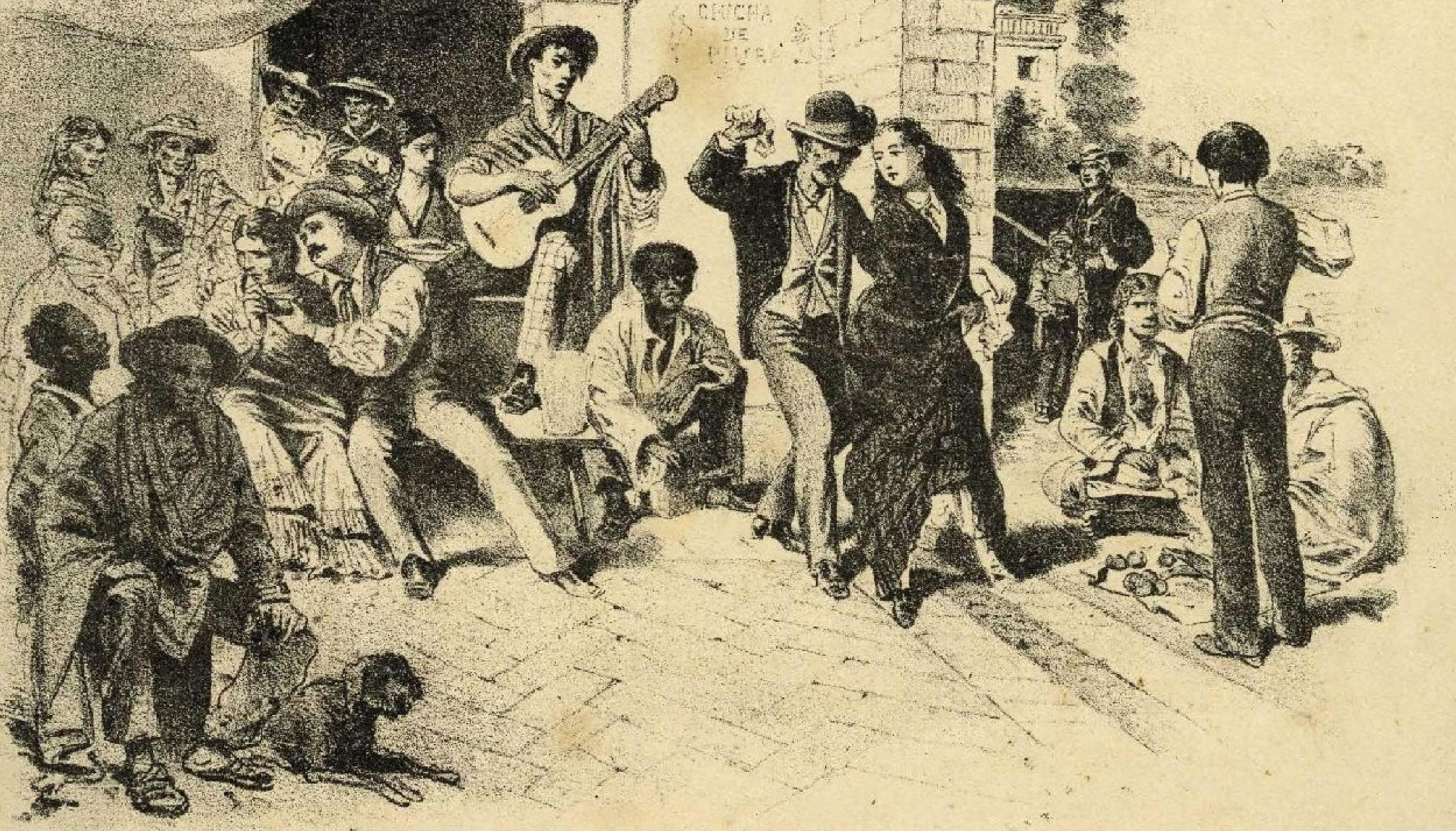 "Álbum sudamericano, Colección de bailes y cantos populares corregidos y arreglados para piano". Milano : Stabilimento di Edoardo Sonzogno, 1870 Contenido: 01. Calla, no lo digas (zamacueca) -- 02. Que si, que no, ya viene (zamacueca) -- 03. ¿Dices que por tí me muero? (zamacueca) -- 04. Otro cachete (zamacueca) -- 05. El toro guapo (zamacueca) -- 06. Alza que te han visto (zamacueca) -- 07. Compadrito gallinazo (zamacueca) -- 08. De cinco tres (zamacueca) -- 09. Si, pero no quiere yo (zamacueca) -- 10. La popular (zamacueca) -- 11. Zambita lloré (zamacueca) -- 12. A la zamba, a la zamba (zamacueca) -- 12. La condición (zamacueca) -- 13. Los imposibles (yaravi) -- 14. El pajarillo (yaravi) -- 15. ¡Qué fatal es mi destino! (yaravi) -- 16. La palomita (yaravi) -- 17. Al cielo pido la muerte (yaravi) -- 18. Cátchua [música quechua rural]-- 19. Tonada chilena -- 20. Tonada chilena -- 21. El amor en cuarto (baile arequipeño)